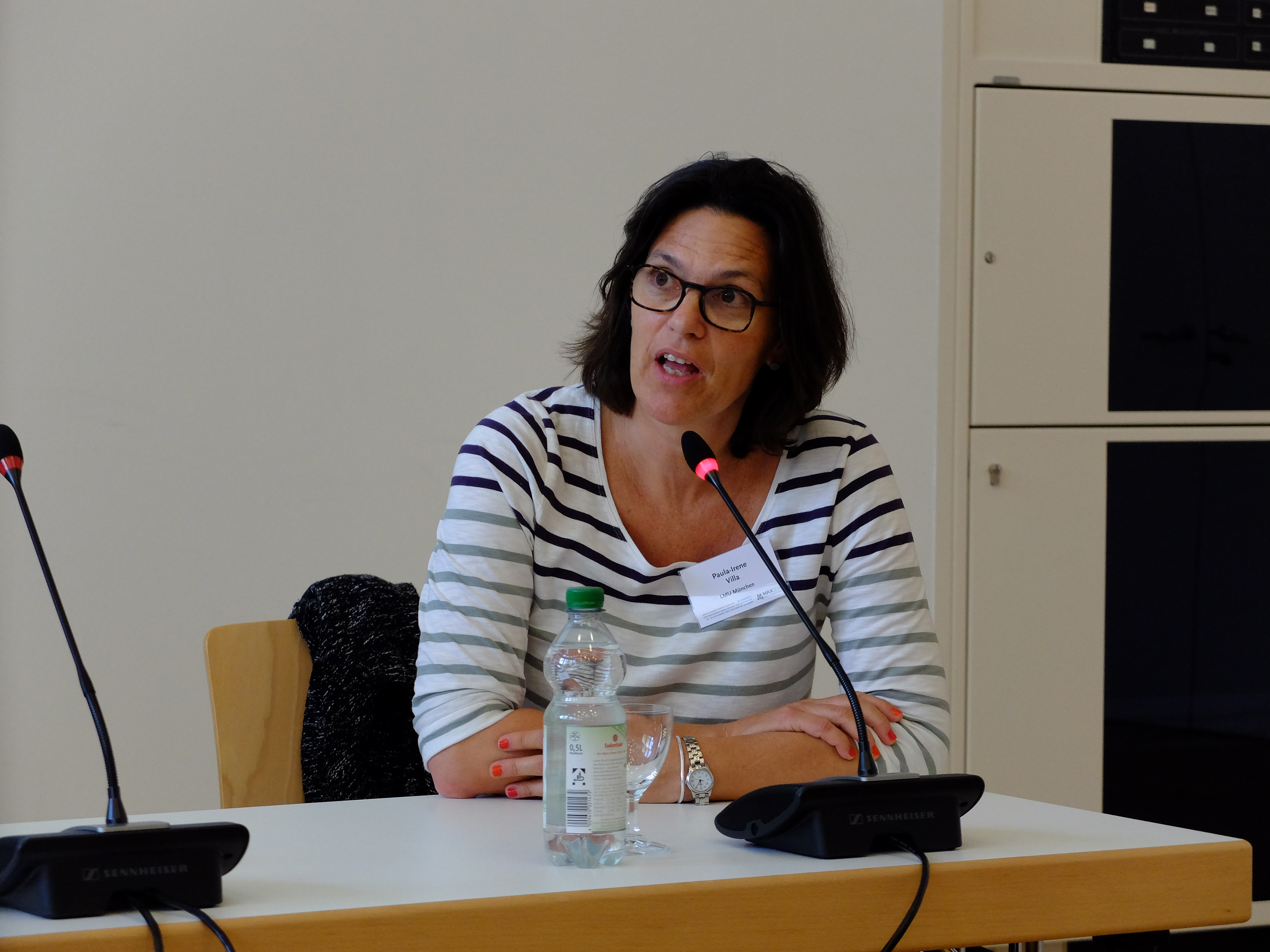 Paula-Irene Villa, 38. Kongress der Deutschen Gesellschaft für Soziologie.